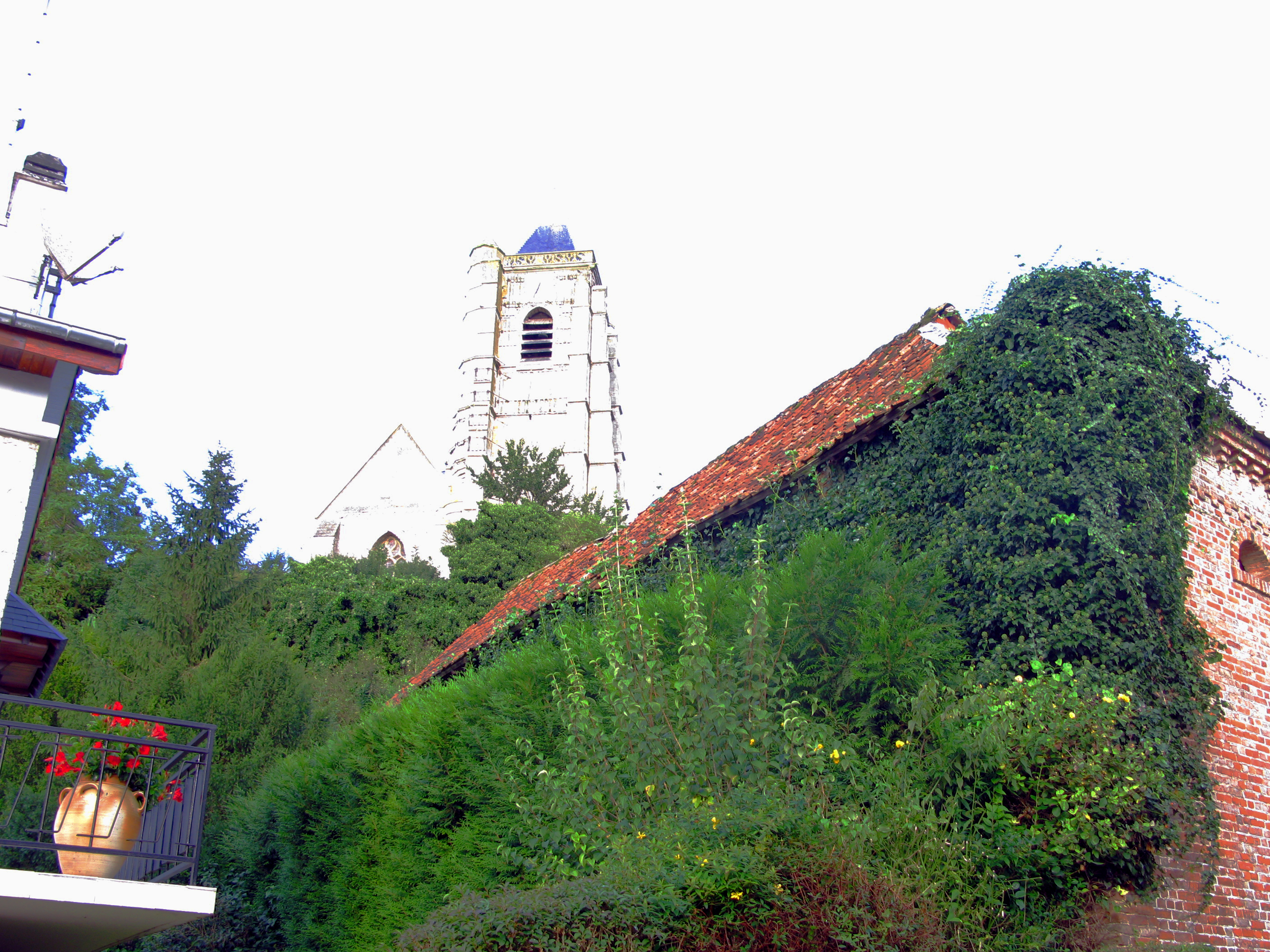 Domart-en-Ponthieu (Somme, France) - L'église domine la petite ville. (Photo aux couleurs et contrastes volontairement accentués pour symboliser l'aspect verdoyant de la vallée et le surplomb de l'église.)